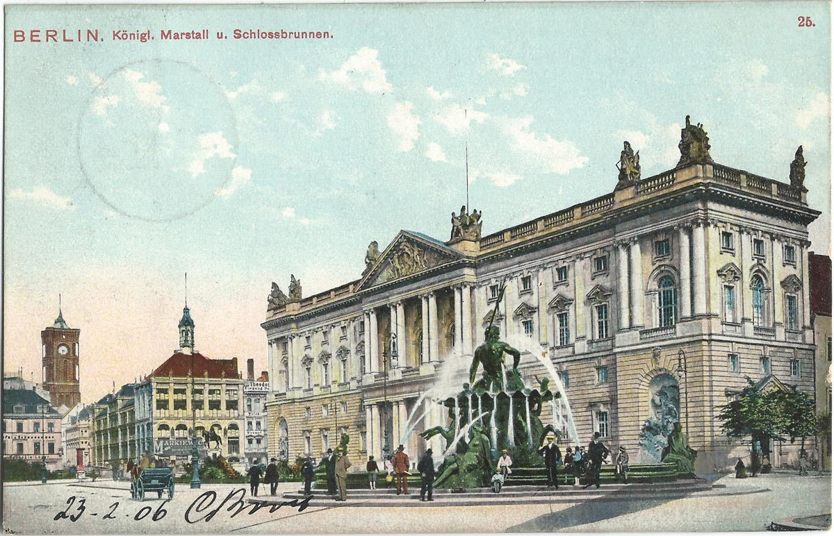 Vue de Berlin au début du XXe siècle (carte postale).